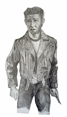 Dibujo a Lápiz